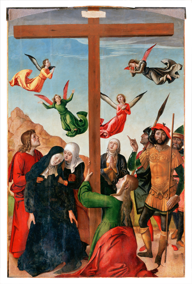 Cruz en el Calvario, temple sobre tabla, 205 x 134 cm, Madrid, Universidad Complutense, Biblioteca Histórica